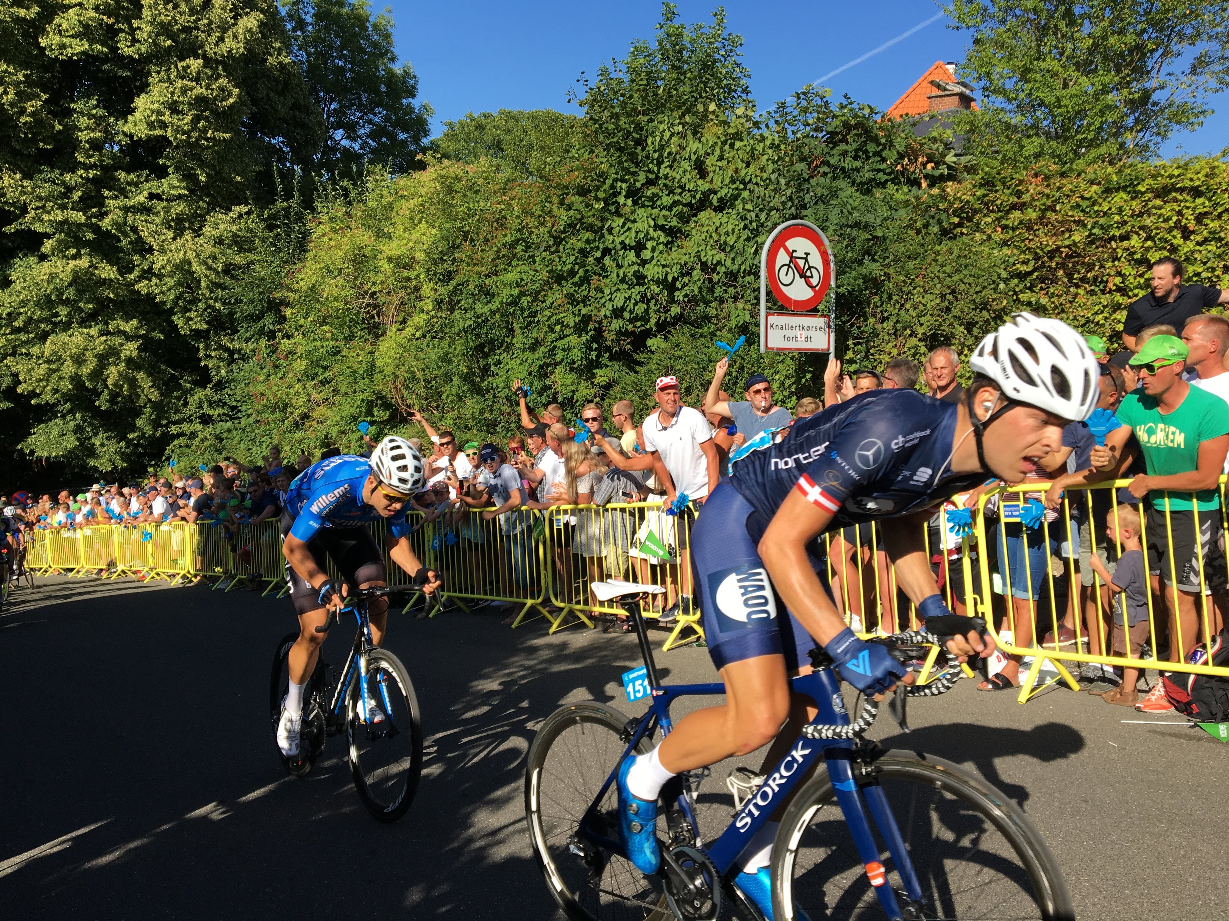 Alexander Kamp og Wout van Aert på vej op ad Kiddesvej i Vejle på 2. etape